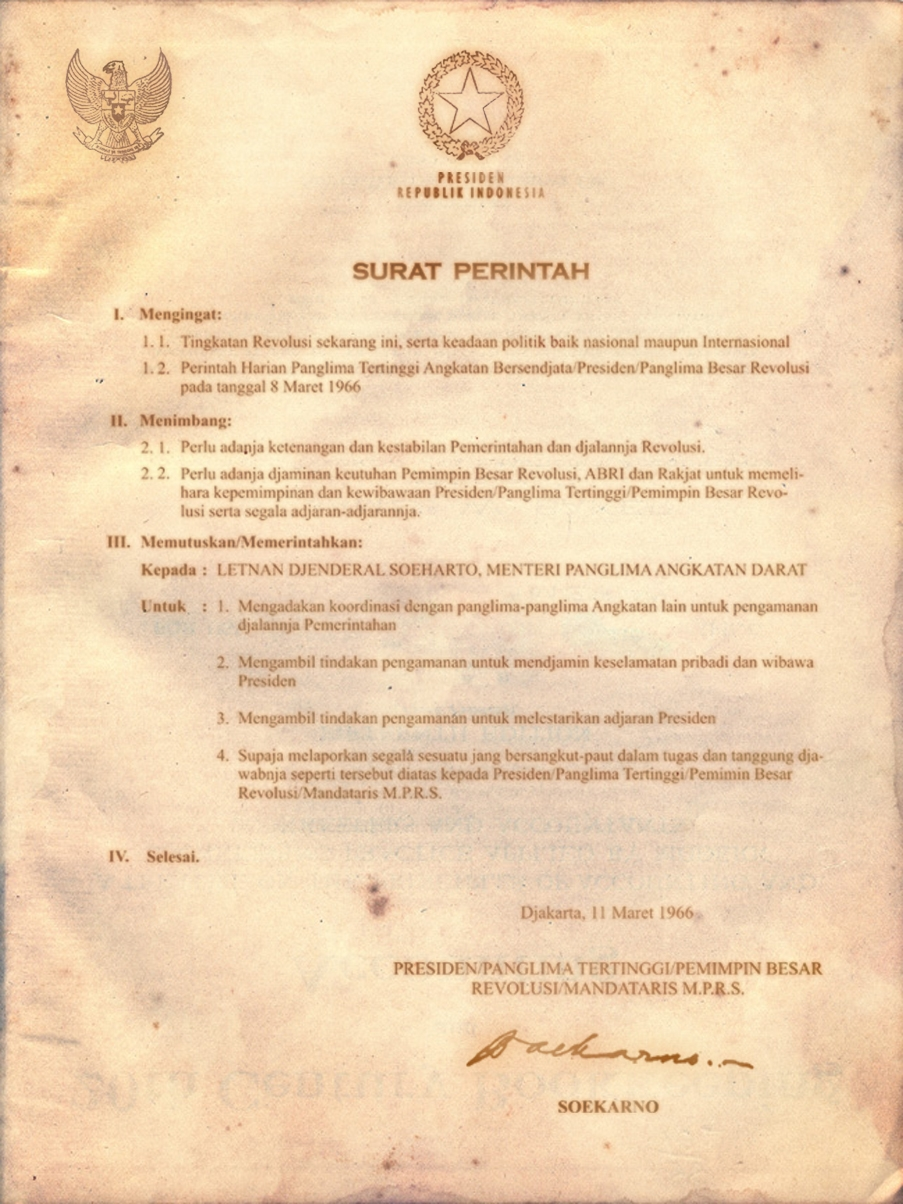 supersemar versi lain